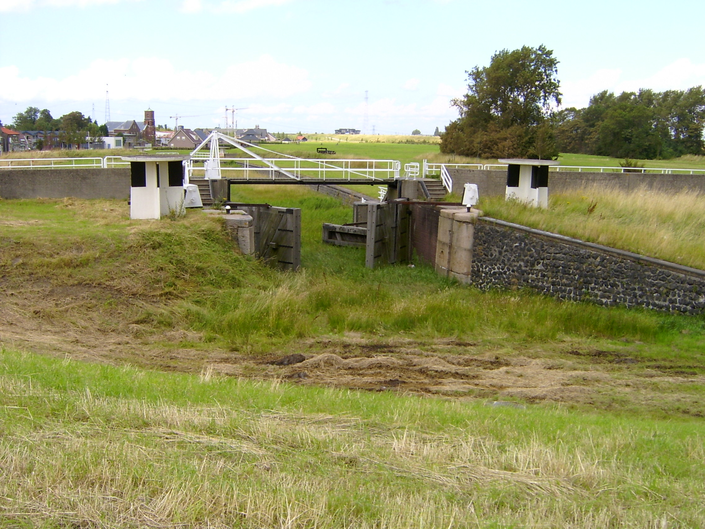 Hansweert, de oude sluis die nu als monument in het weiland ligt.